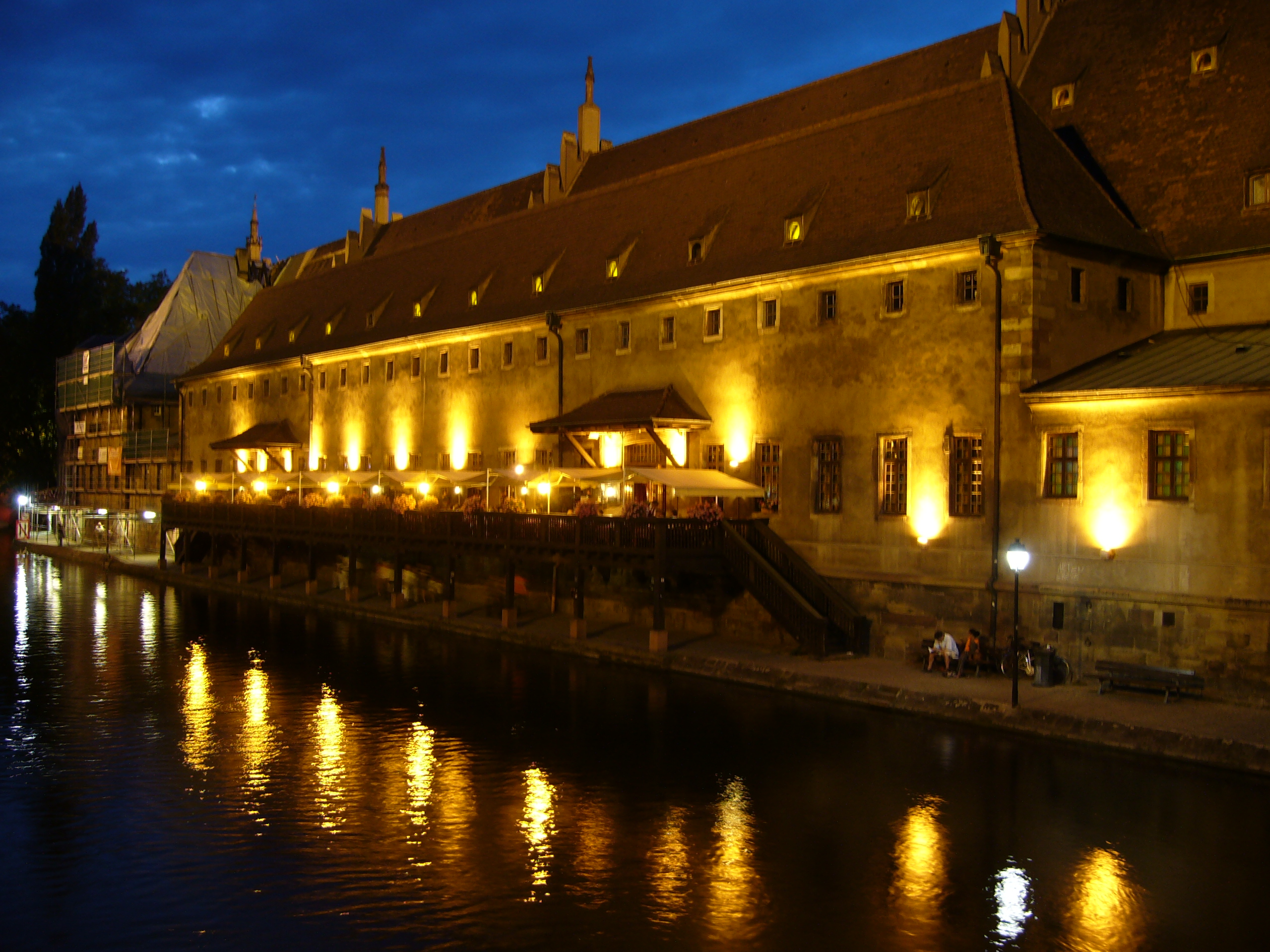 L'ancienne douane